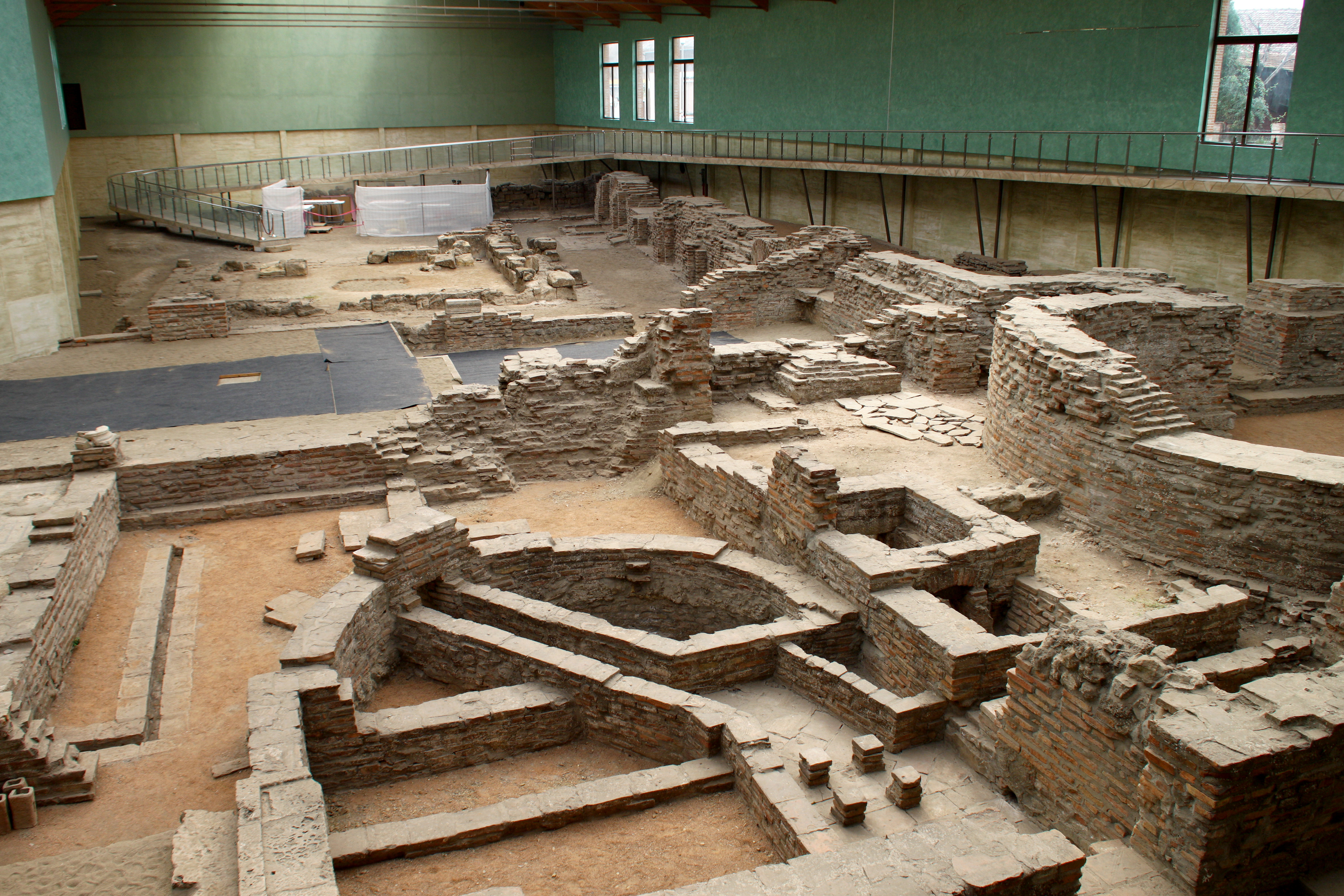 Српски (ћирилица): Визиторски центар „Царска палата“, Сремска Митровица, Србија.